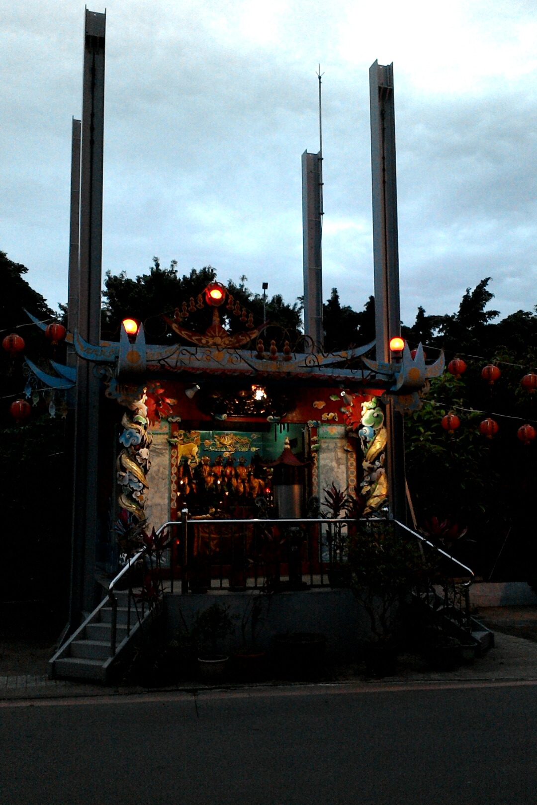 夜間的三腳渡天德宮,台北市士林區後港次分區福華里